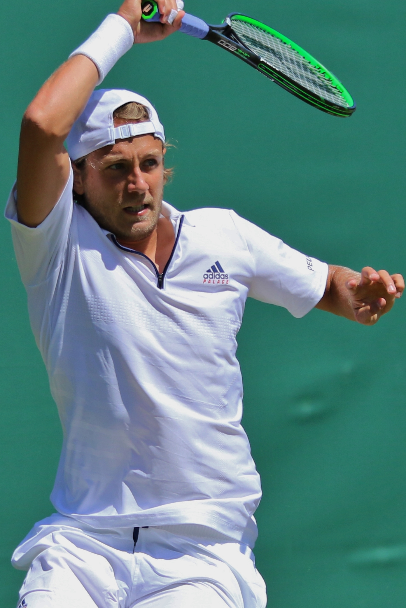 Pouille WM18 (91)